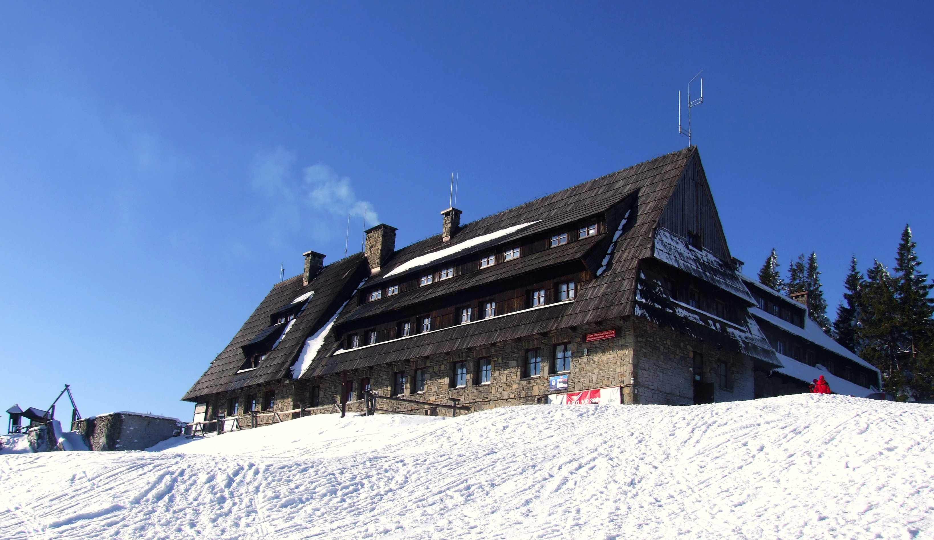 Schronisko PTTK na Turbaczu